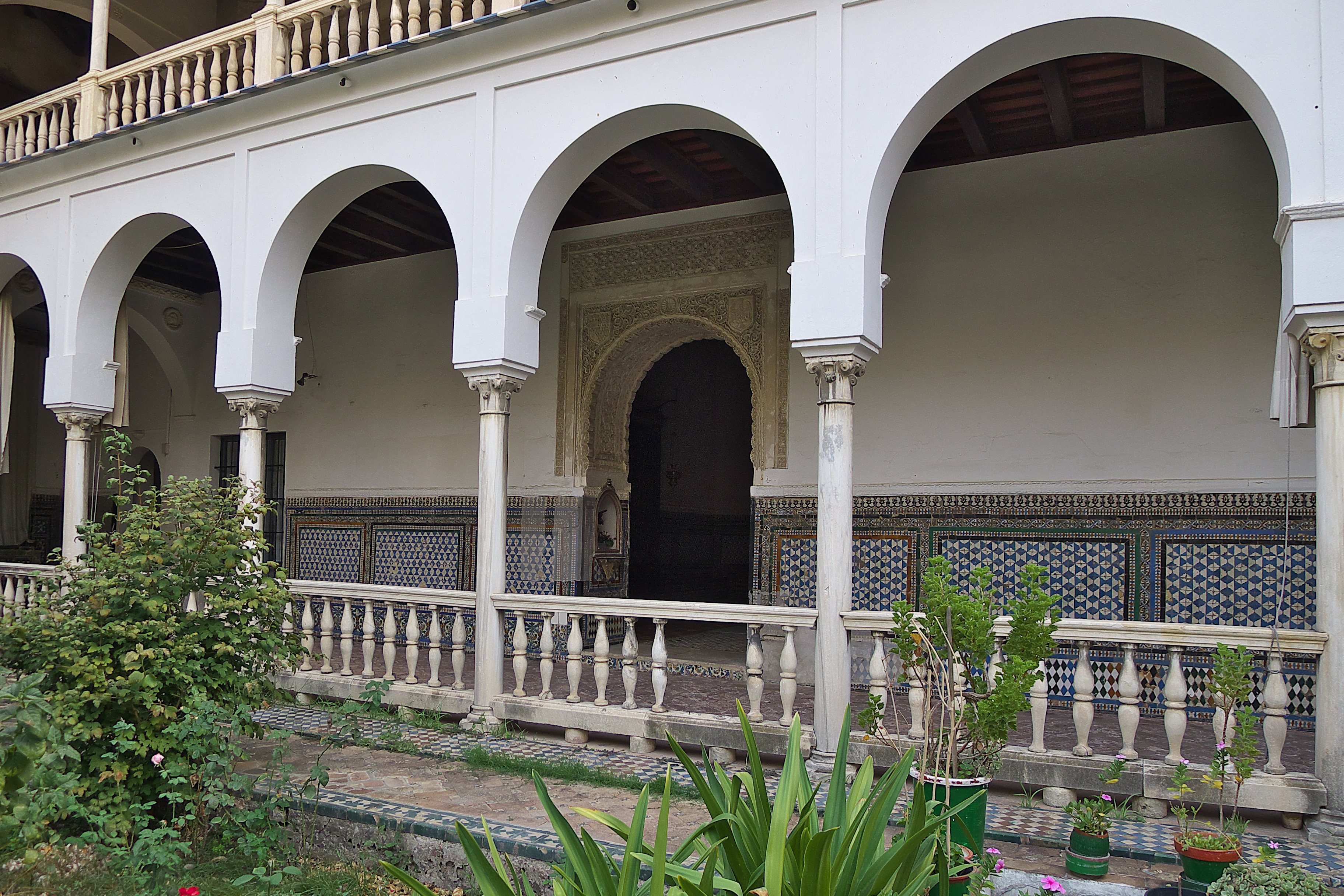 Claustro del Herbolario. Portada mudéjar de la sala capitular. Posiblemente procedente de un original palacio mudéjar perteneciente a Alonso Fernández Coronel.